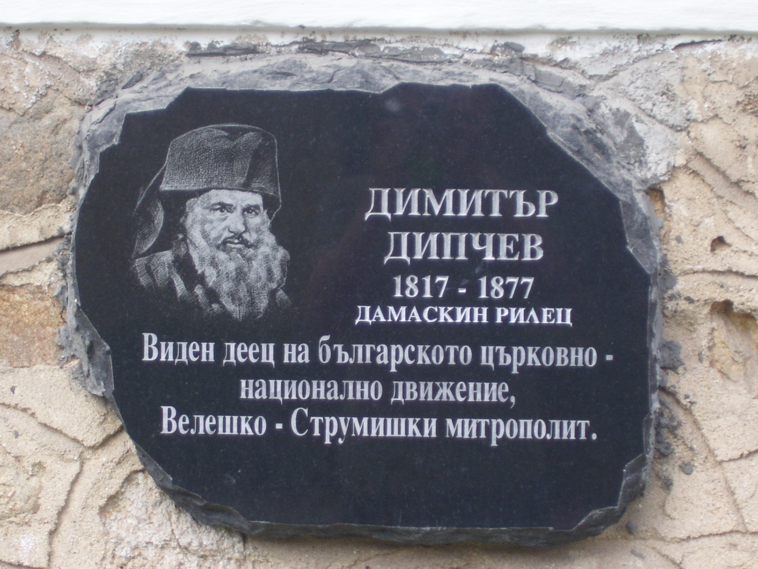 Паметна плоча на Дамаскин Рилец в родното му Панагюрище.